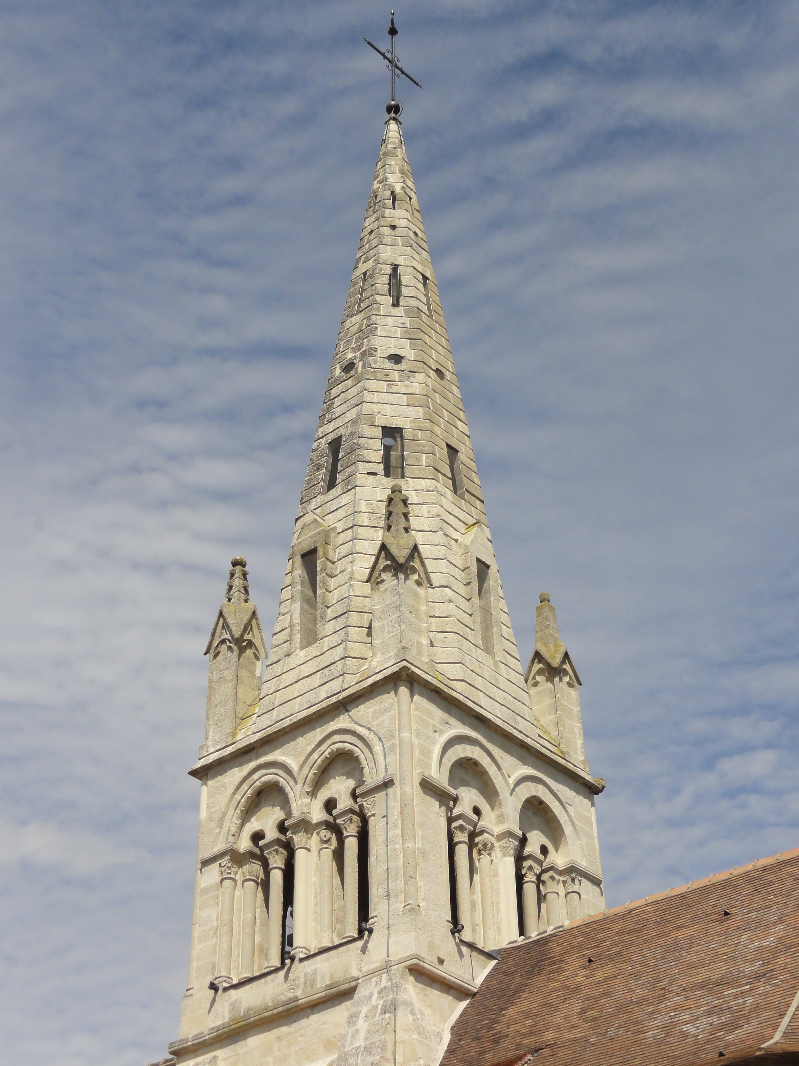 Église Saint-Martin de Néry (voir titre).